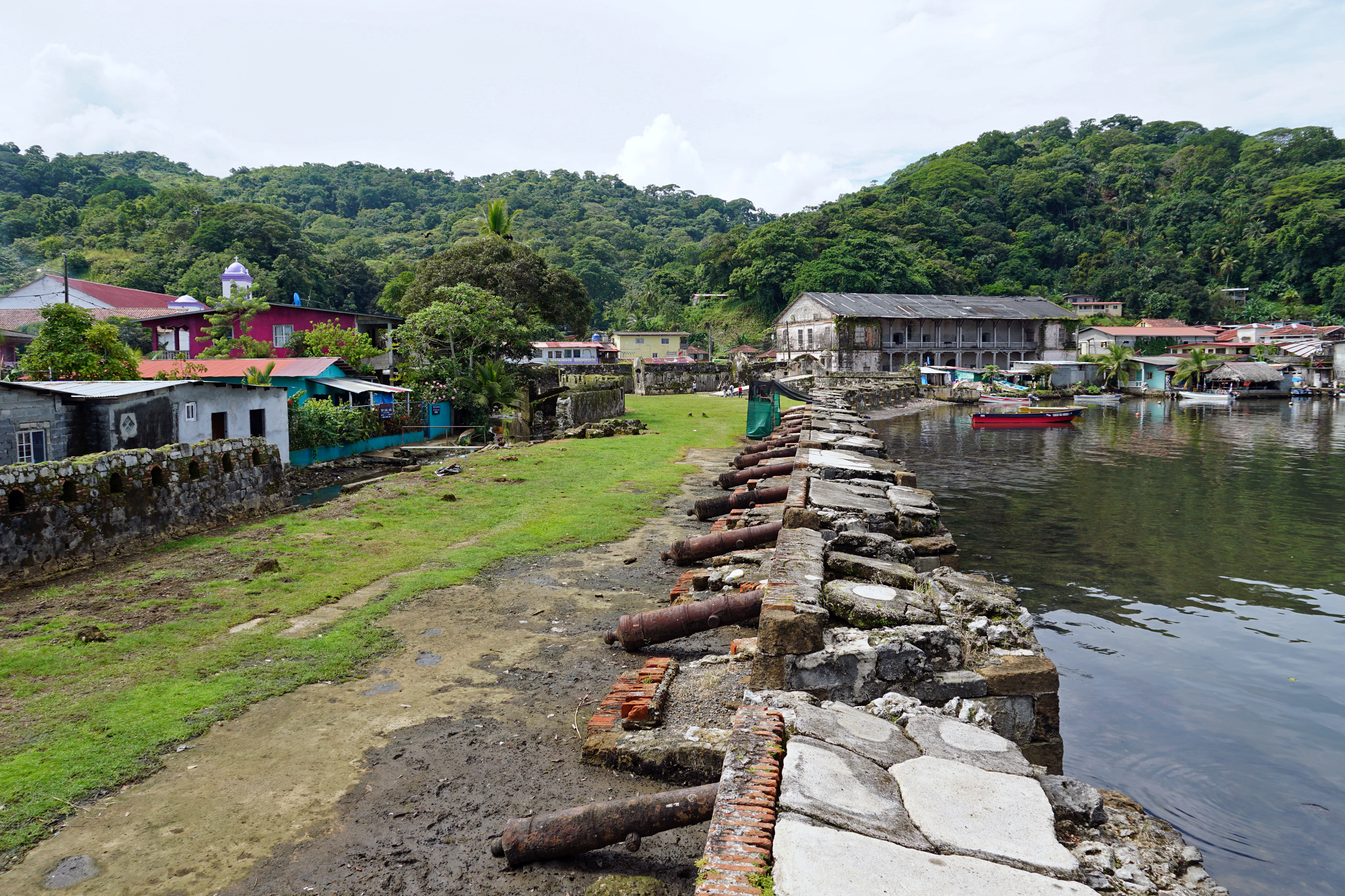 Ruinas del Castillo San Jerónimo, Portobelo, Panamá